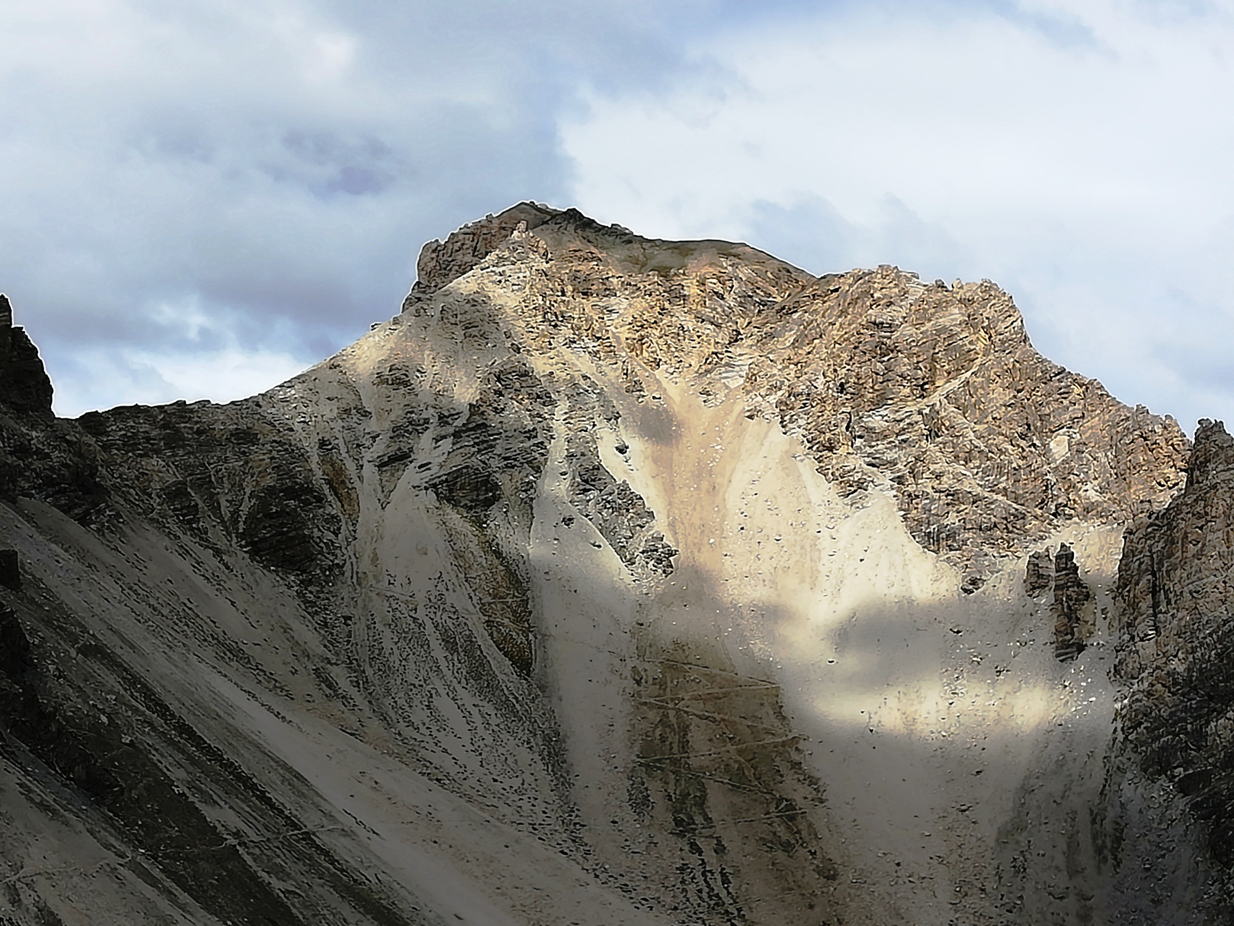 La punta Clotesse vista dal versante italiano. A sinistra il passo des Desertes.